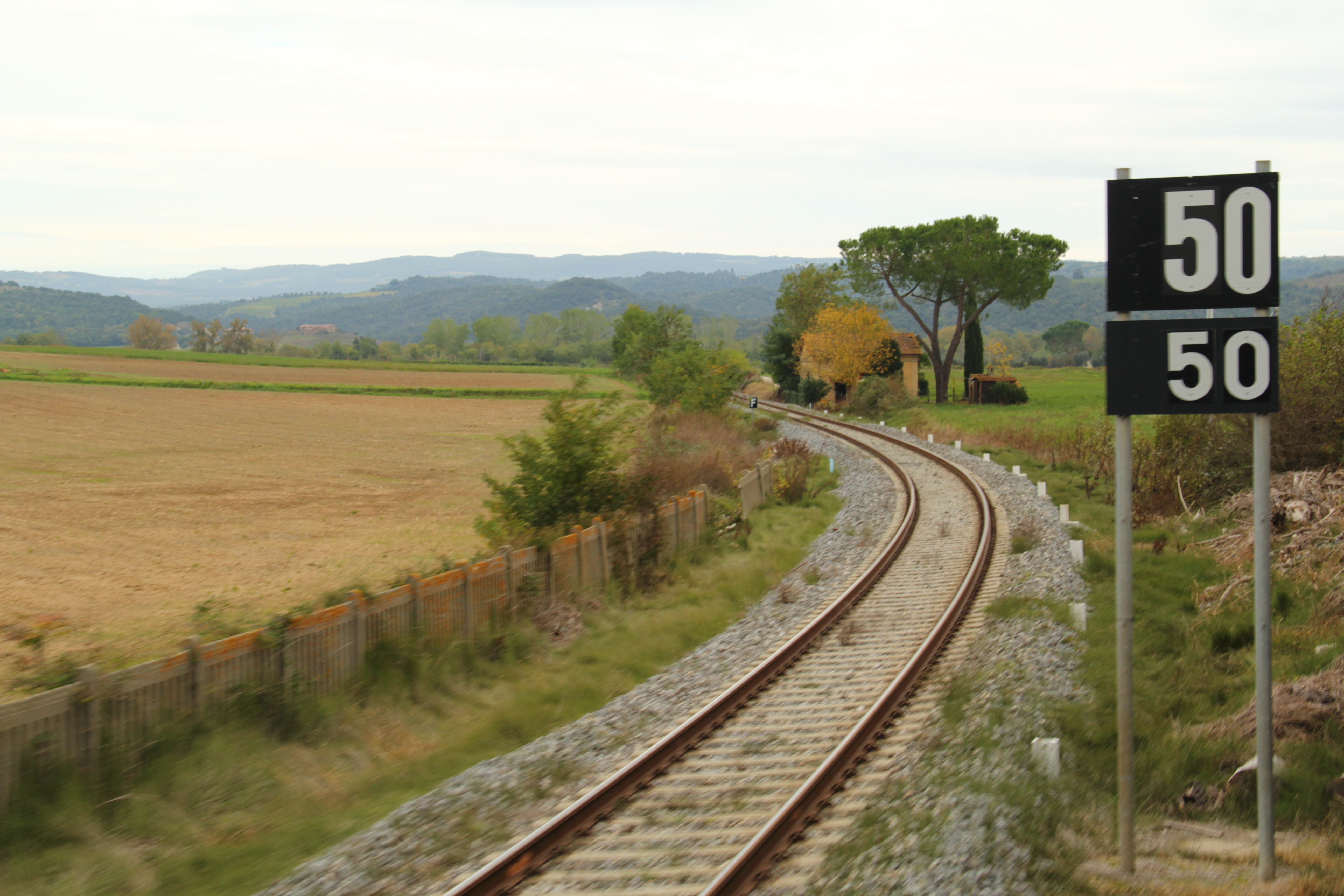 Ferrovia Siena - Grosseto fotografata nei pressi della diramazione con la linea Asciano - Monte Antico, nei pressi di Monte Antico.